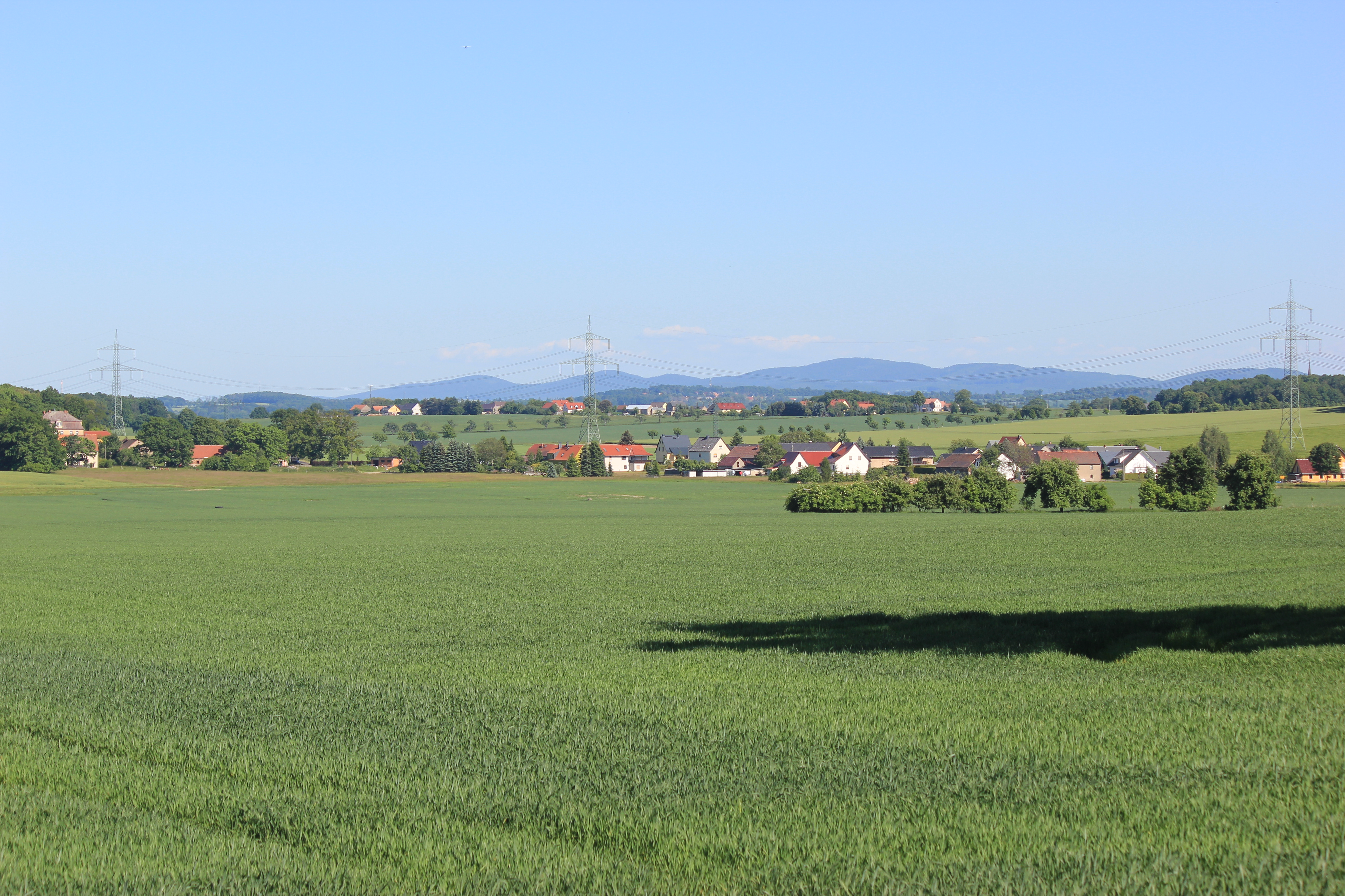 Hornjoserbsce: Napohlad Łusča ze sewjerozapada z Čornobohom w pozadku.